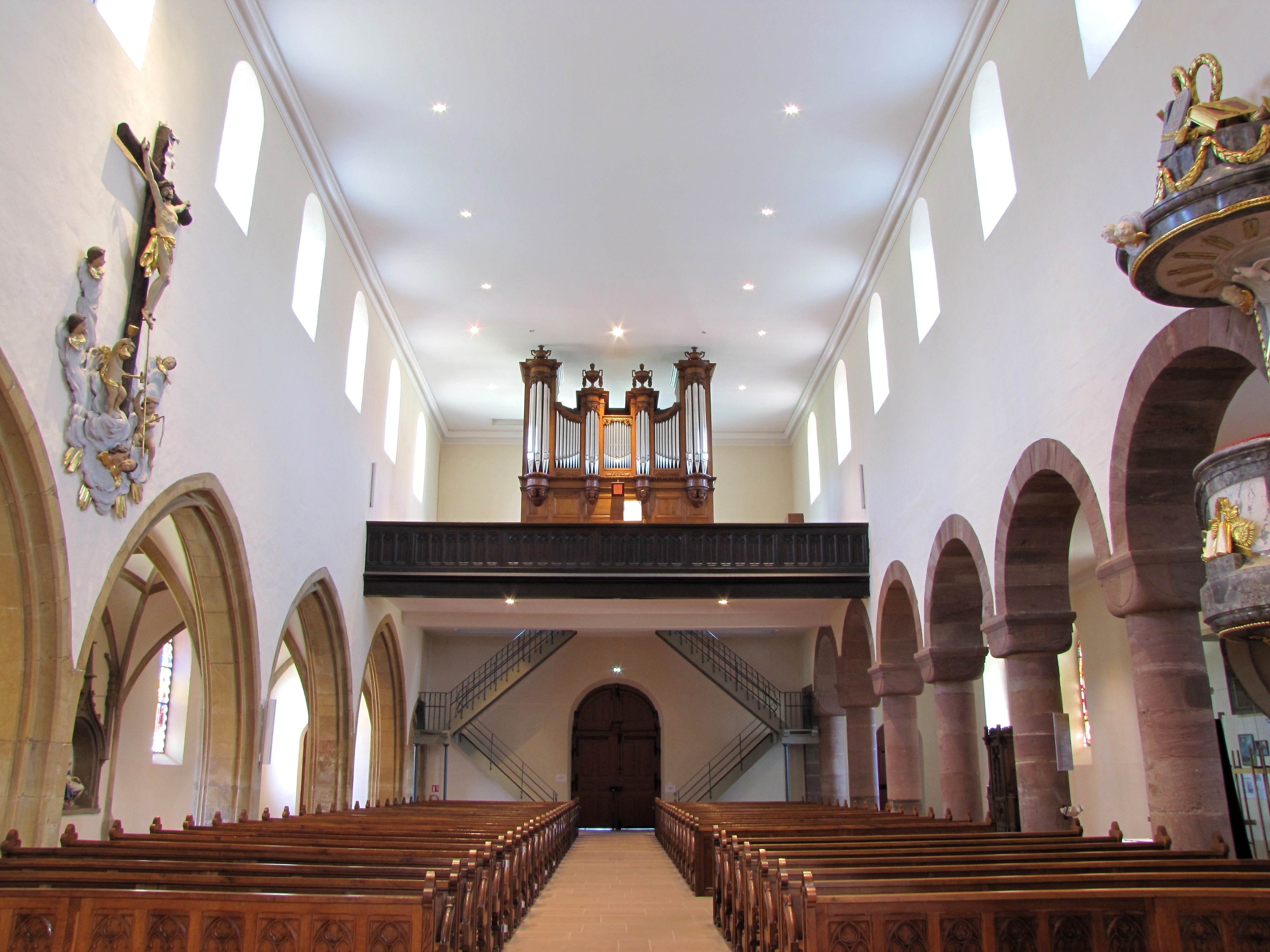 Alsace, Haut-Rhin, Église Saint-Sébastien de Soultzmatt (PA00085689, IA68004357): Vue intérieure de la nef vers la tribune d'orgue.